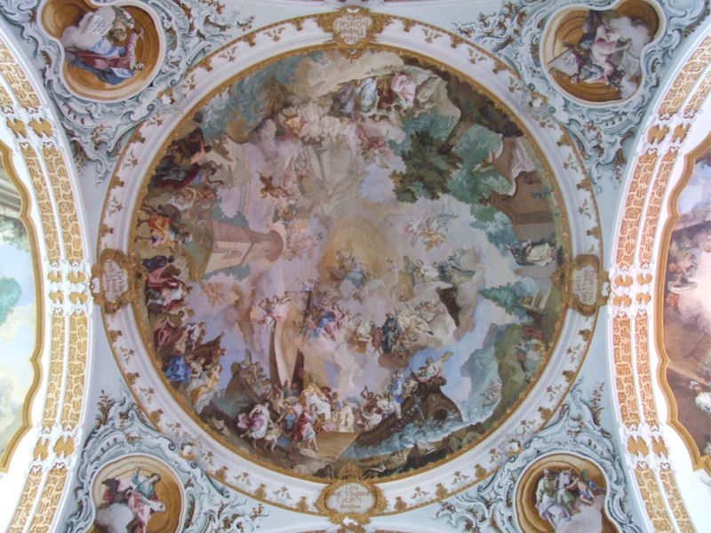 Wallfahrtkirche Marienberg near Raitenhaslach, Germany